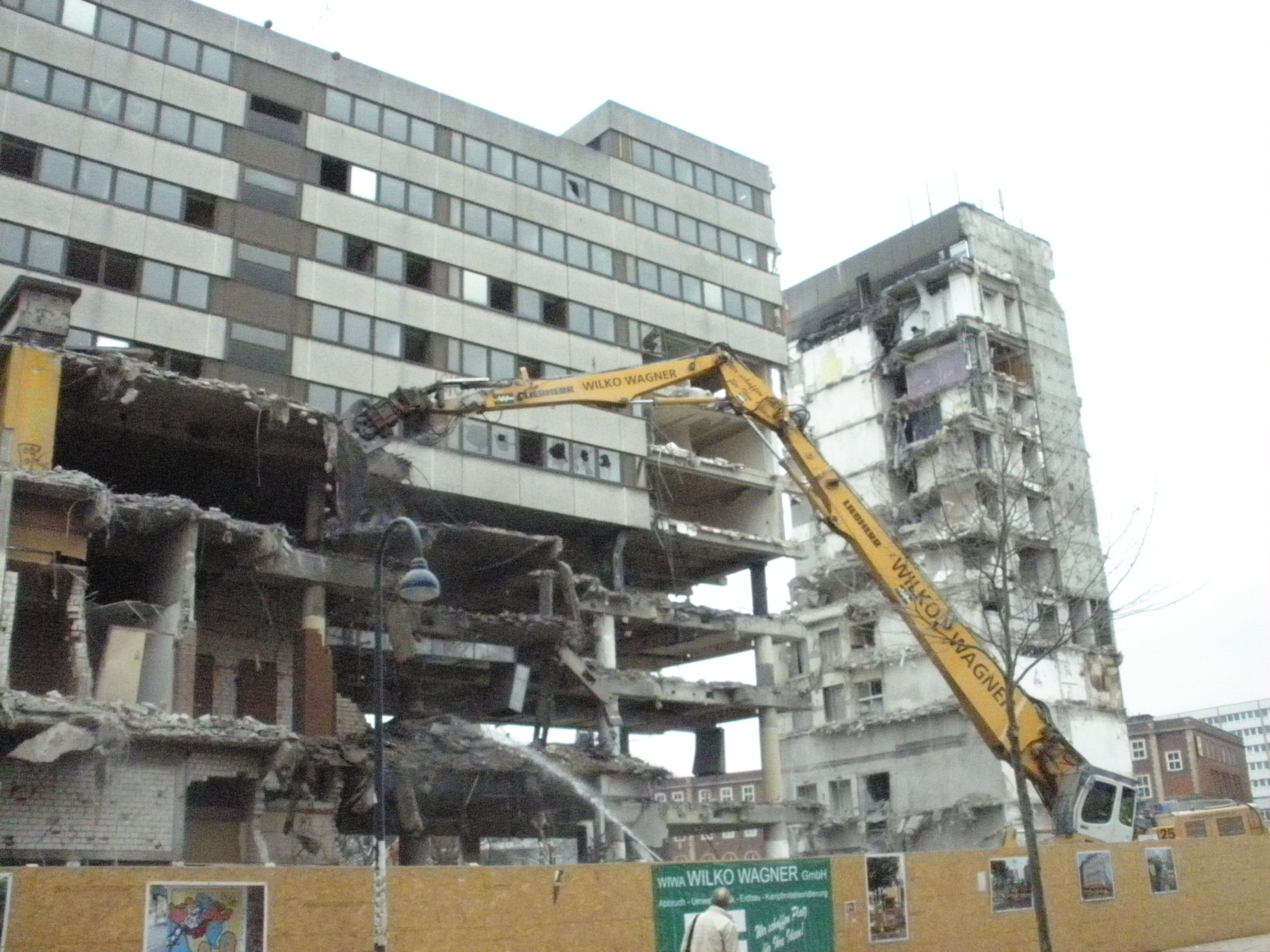 abriss des frapant karstadt in der großen bergstraße hamburg-altona